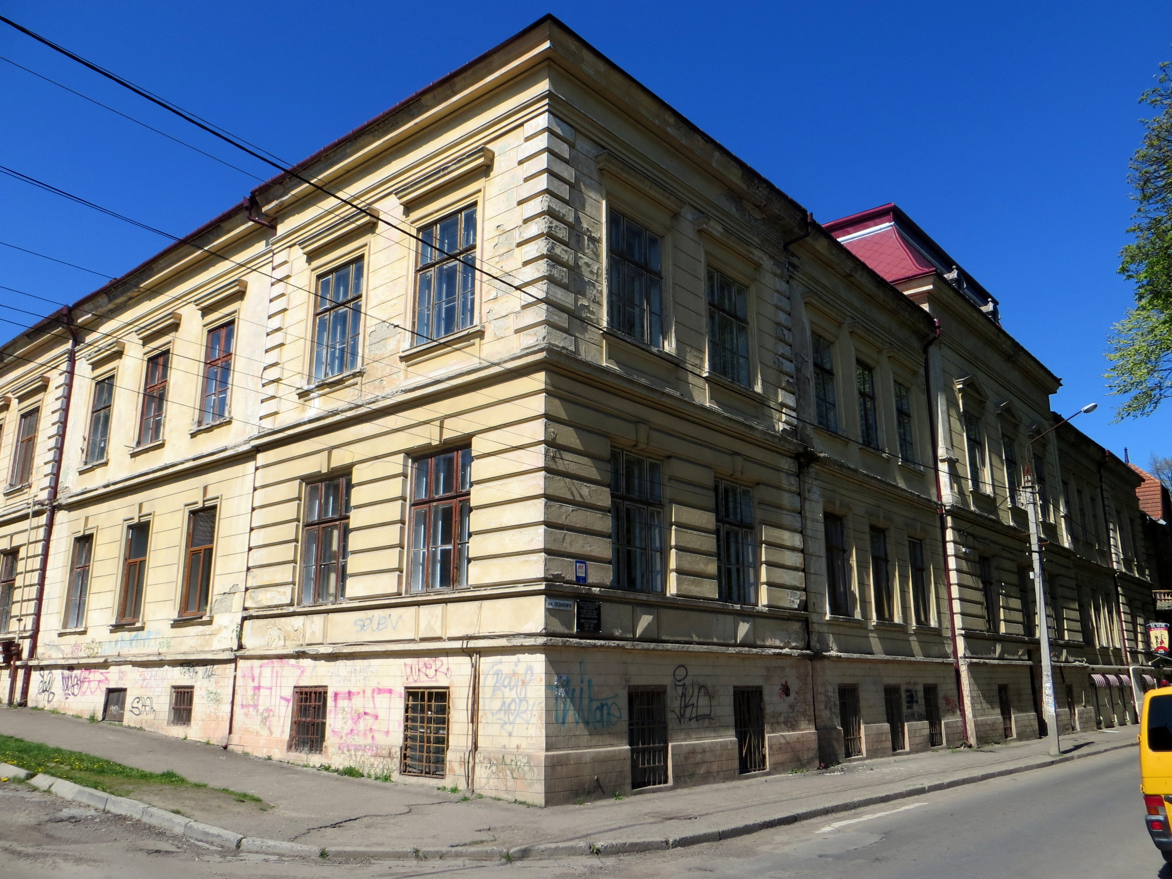 Будинок\колишня бурса\,в якому проживав Загул Д.Ю.-український поет., Чернівці, вул.Федьковича,16